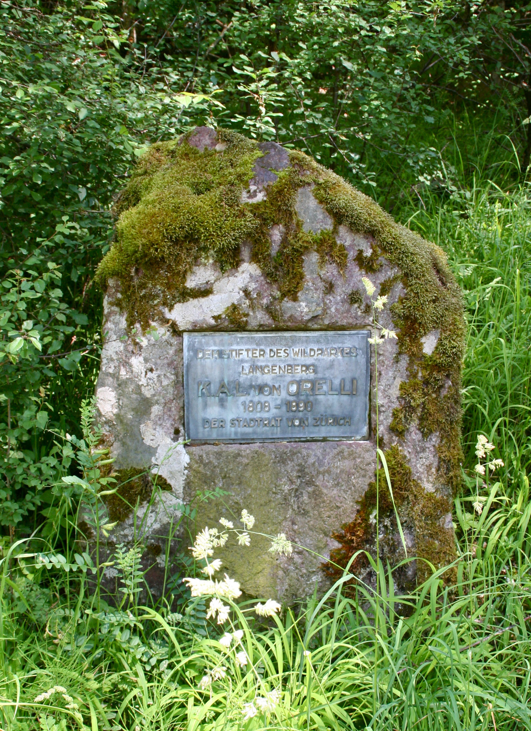 Wildpark Langenberg Gedenkstein an